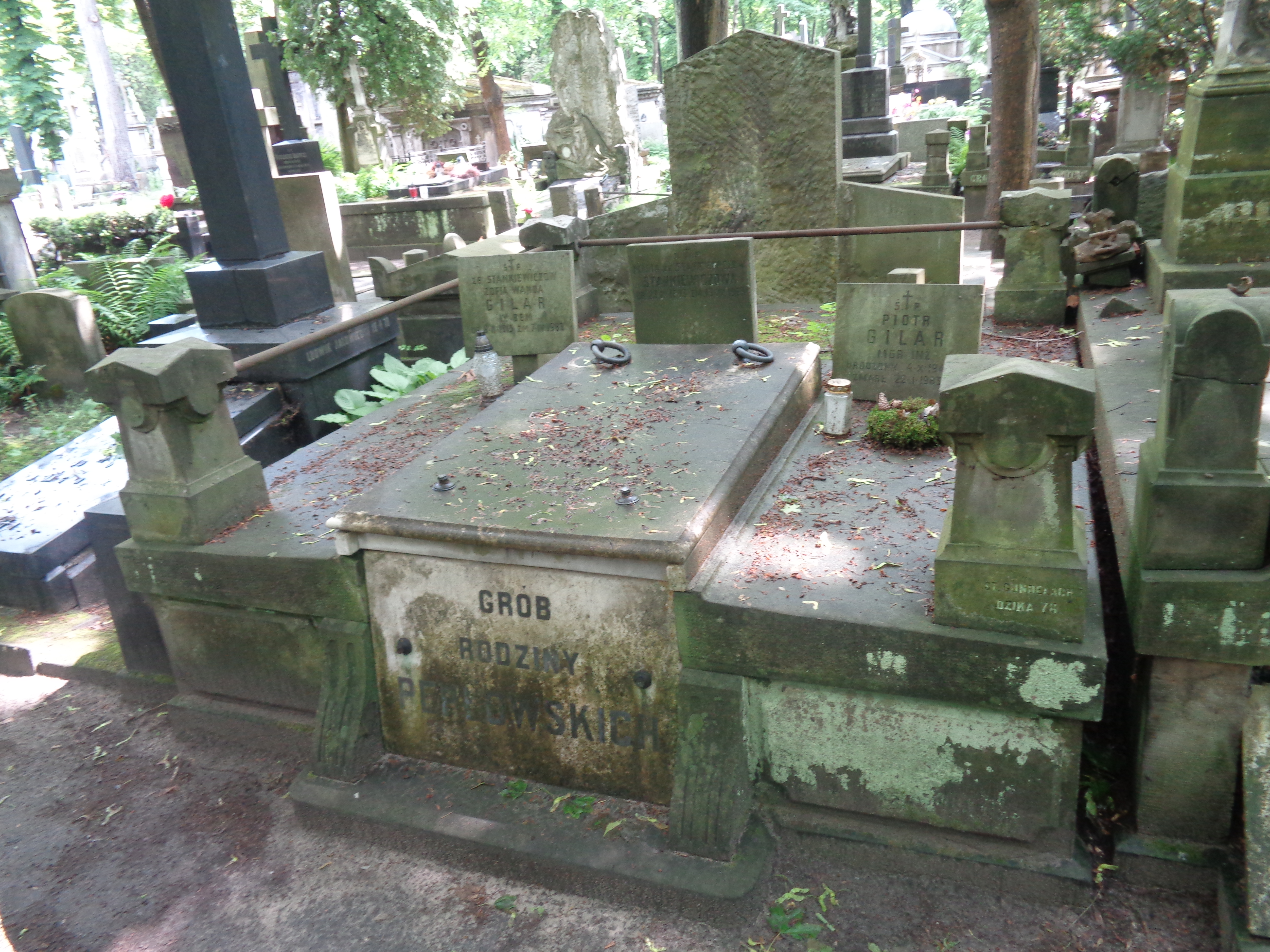 Grób Adolfa Pepłowskiego na Cmentarzu Powązkowskim